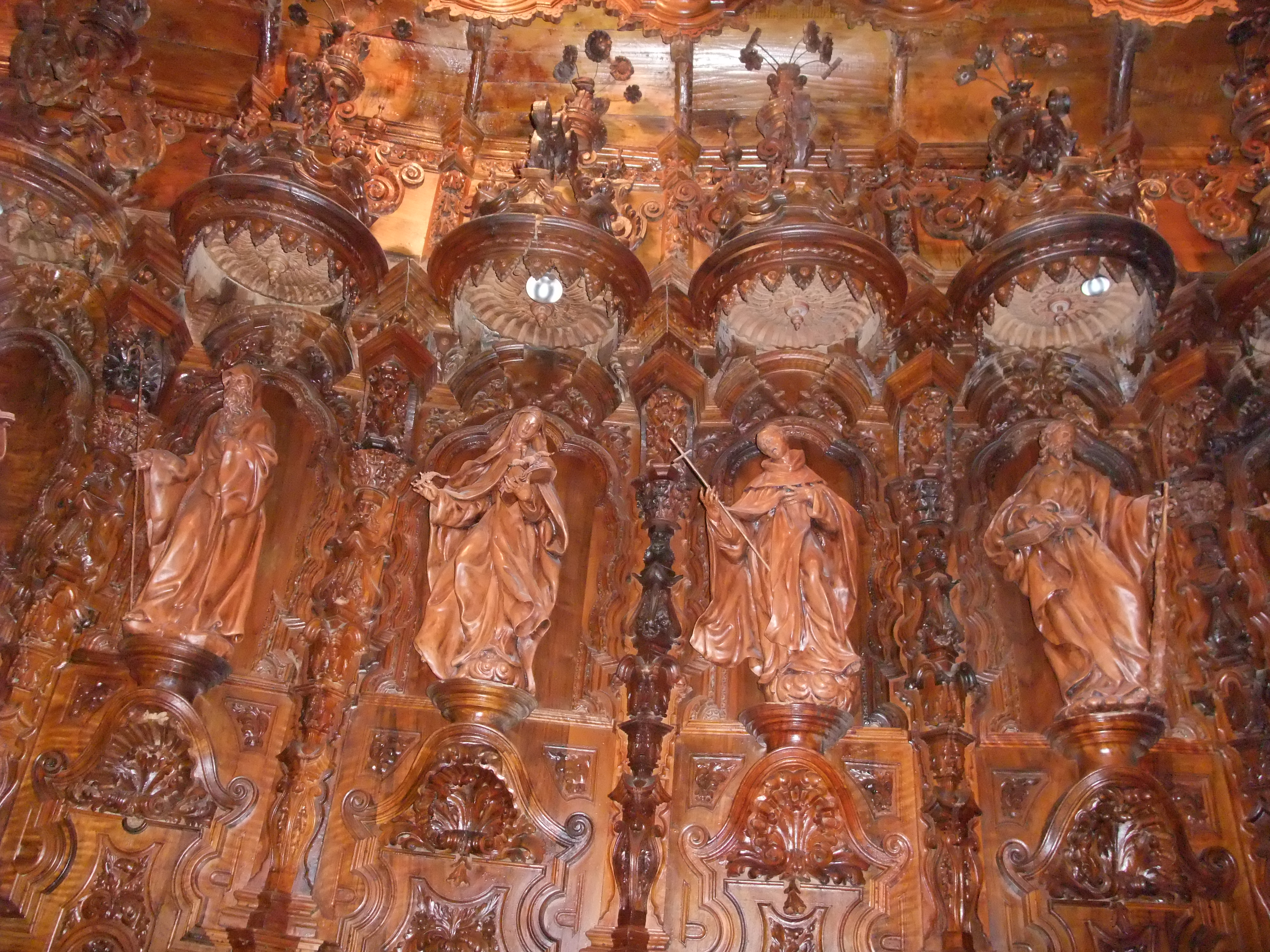 Guadix (Granada)-Catedral-6-Coro